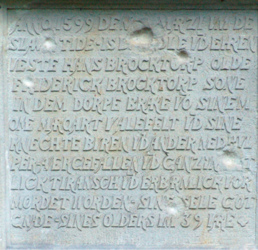 Gedenktafel an Hans von Brockdorff an der Ostwand der St.-Gabriel-Kirche in Haseldorf . Inschrift:ANNO 1599 DEN (9) MARZI VM DE / SLA W(EN)TIDE. IS D(E E) DLE VD EHREN / VESTE HANS BROCKTORP OL- DE / FRIDERICK BROCKTORP SONE / IN DEM DORPE BRAKE VO SINEM / OME MARQART V ALEFEL T VD SINE / KNECHTE BVREN VD AN- DER MEDHVL/PER AVERGEFALLEN VD GANZVN(CHRIS)T / LICK TIRANSCH VD ER- BARMLICK VOR / MORDET WORDEN. SINE SE- LE GOT / GNADE. SIND ES OLDERS IM 39 IARE